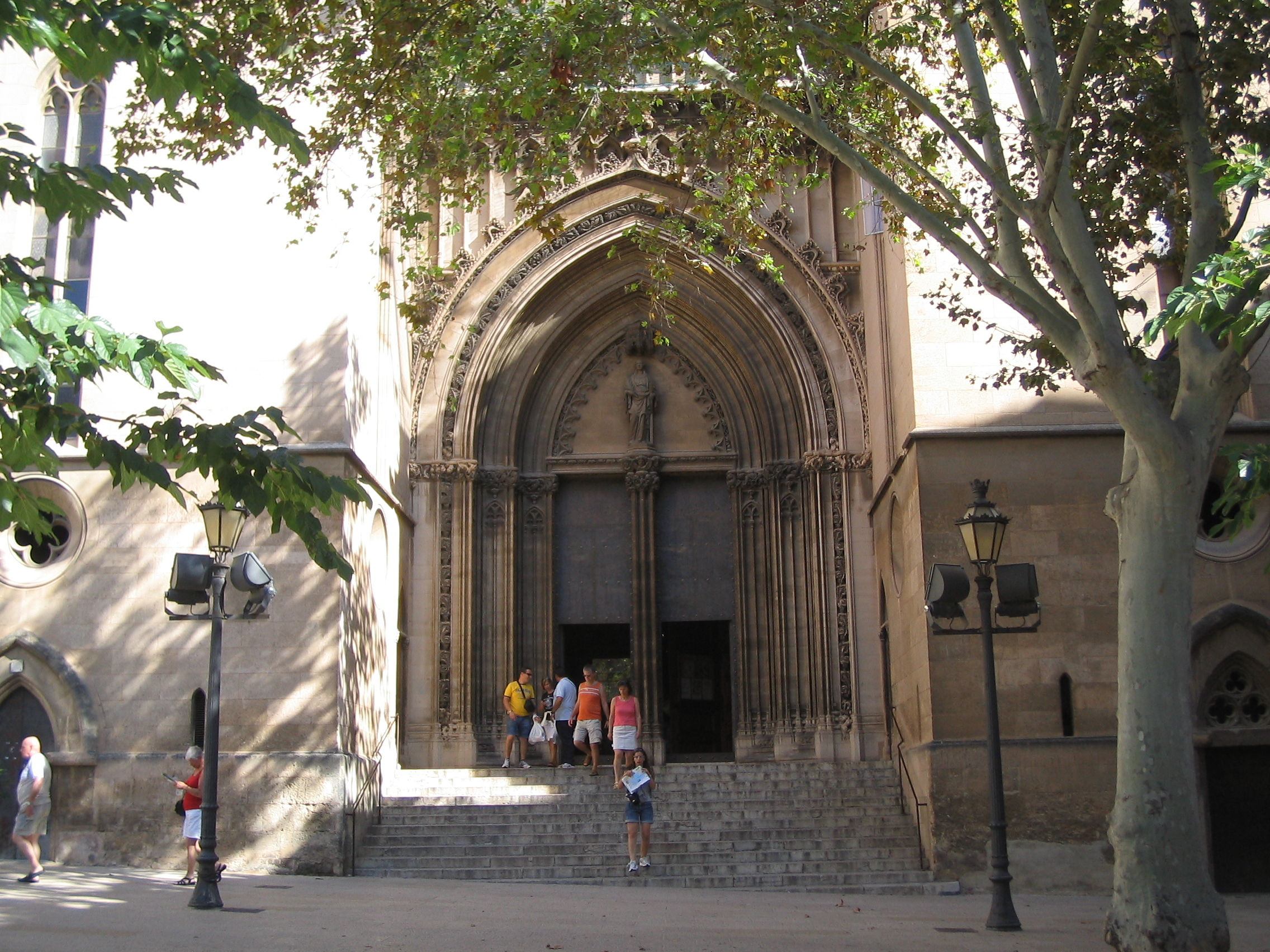 Iglesia